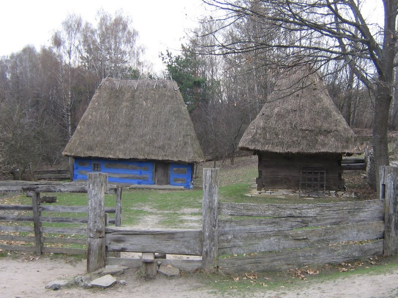 Садиба з села Теребля Закарпатської області